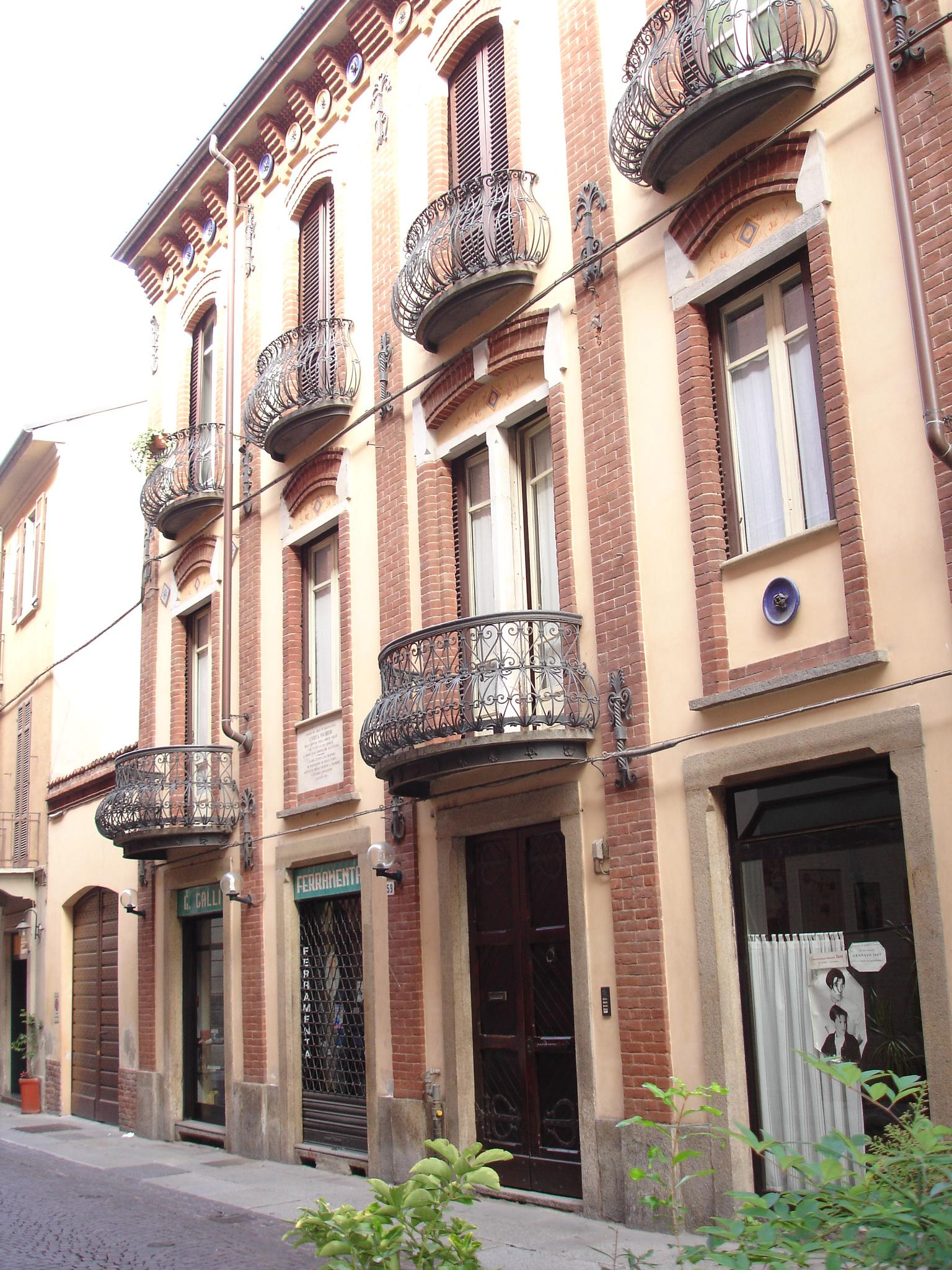 Casa natale di Andrea Vochieri nell'omonima via ad Alessandria